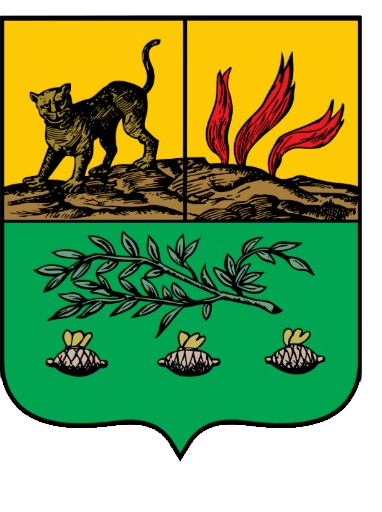 Официальный герб города Шеки в годы Российской империи ссылается на официальный сайт Президентской библиотеки АР [1],[2] и [3]